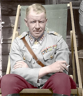 Jatkosodan Ratsuväkiprikaatin komentaja Lars Melander.